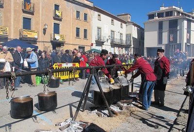 Cuinant l'Escudella a la Plaça Nova de Castellterçol